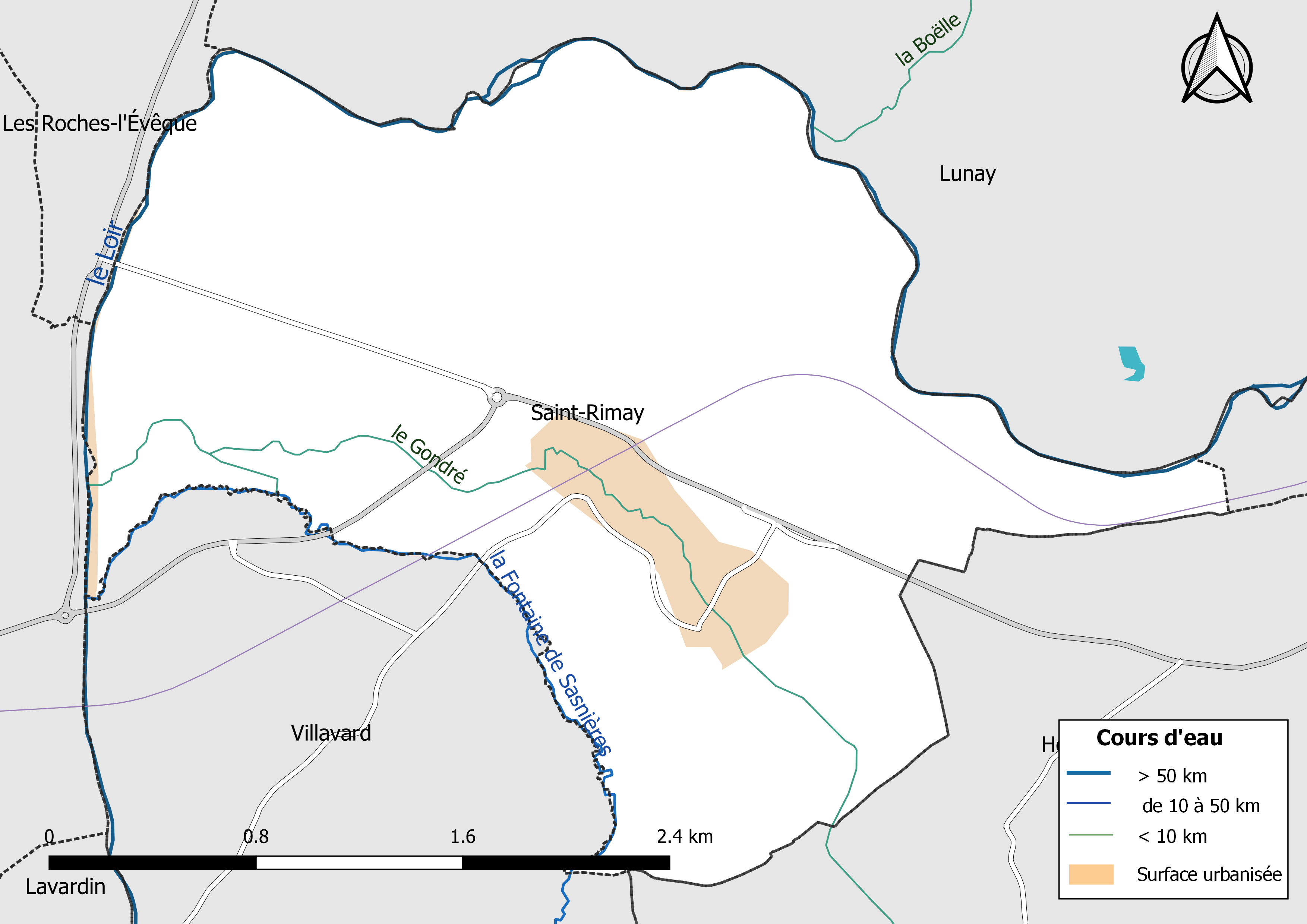 Carte du réseau hydrographique de la commune de Saint-Rimay (Loir-et-Cher, France).